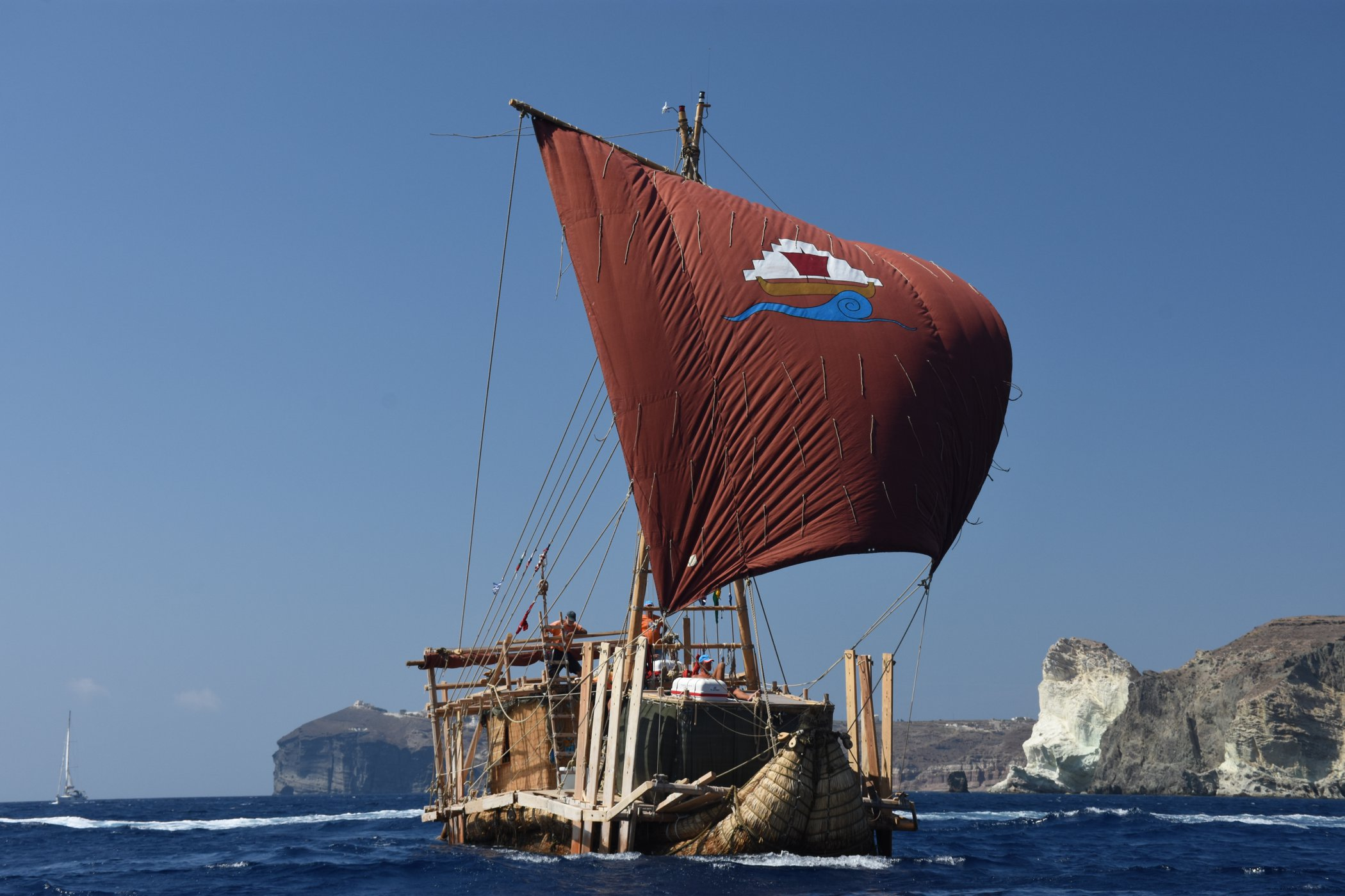 Befahrung der Südküste von Santorin mit ABORA IV